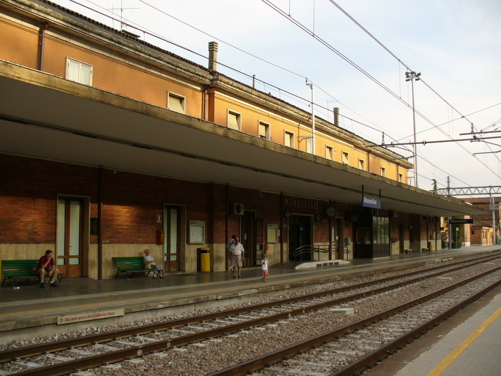 Monselice - stazione ferroviaria, Padua, Italia.